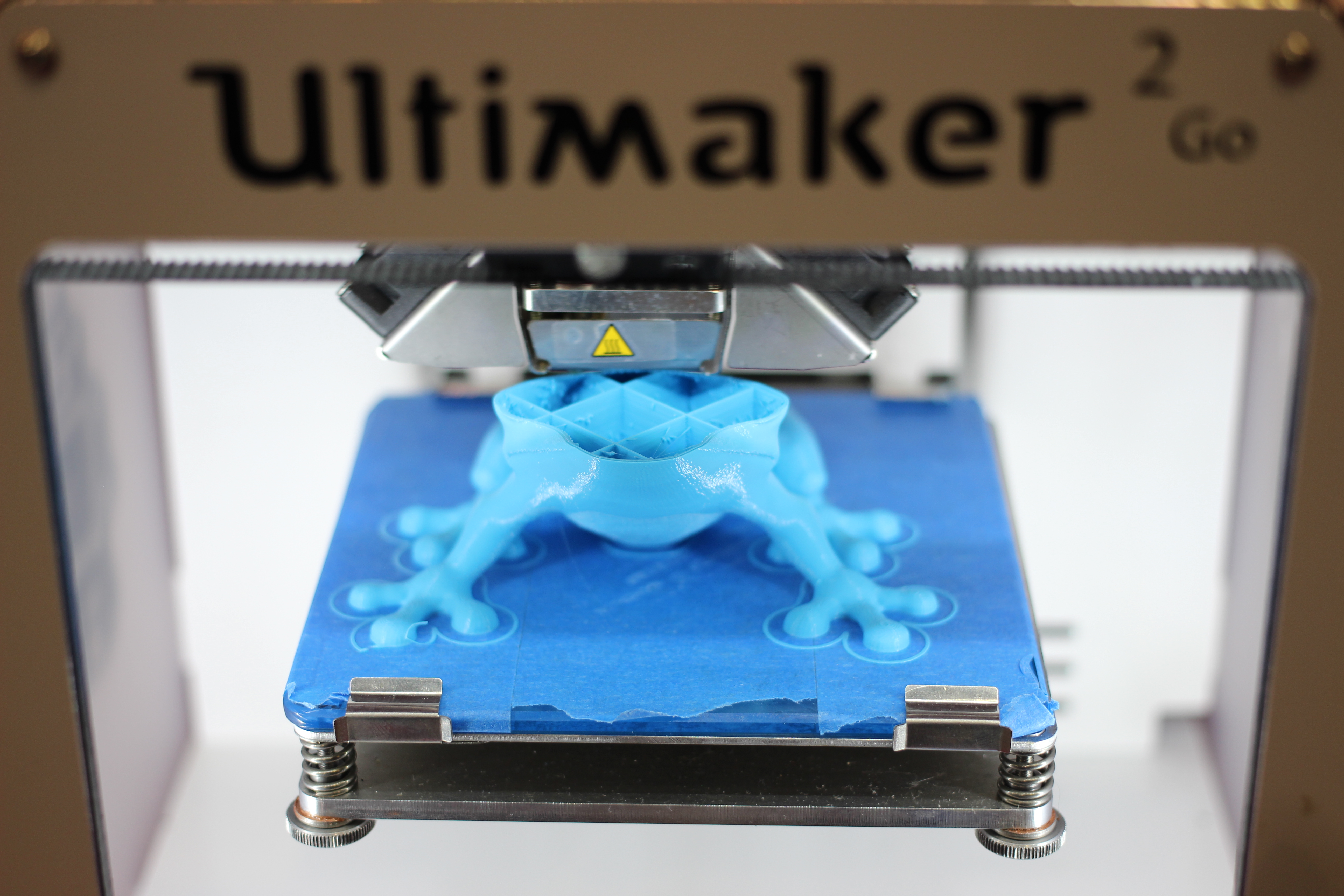 Ultimaker 3D Printer